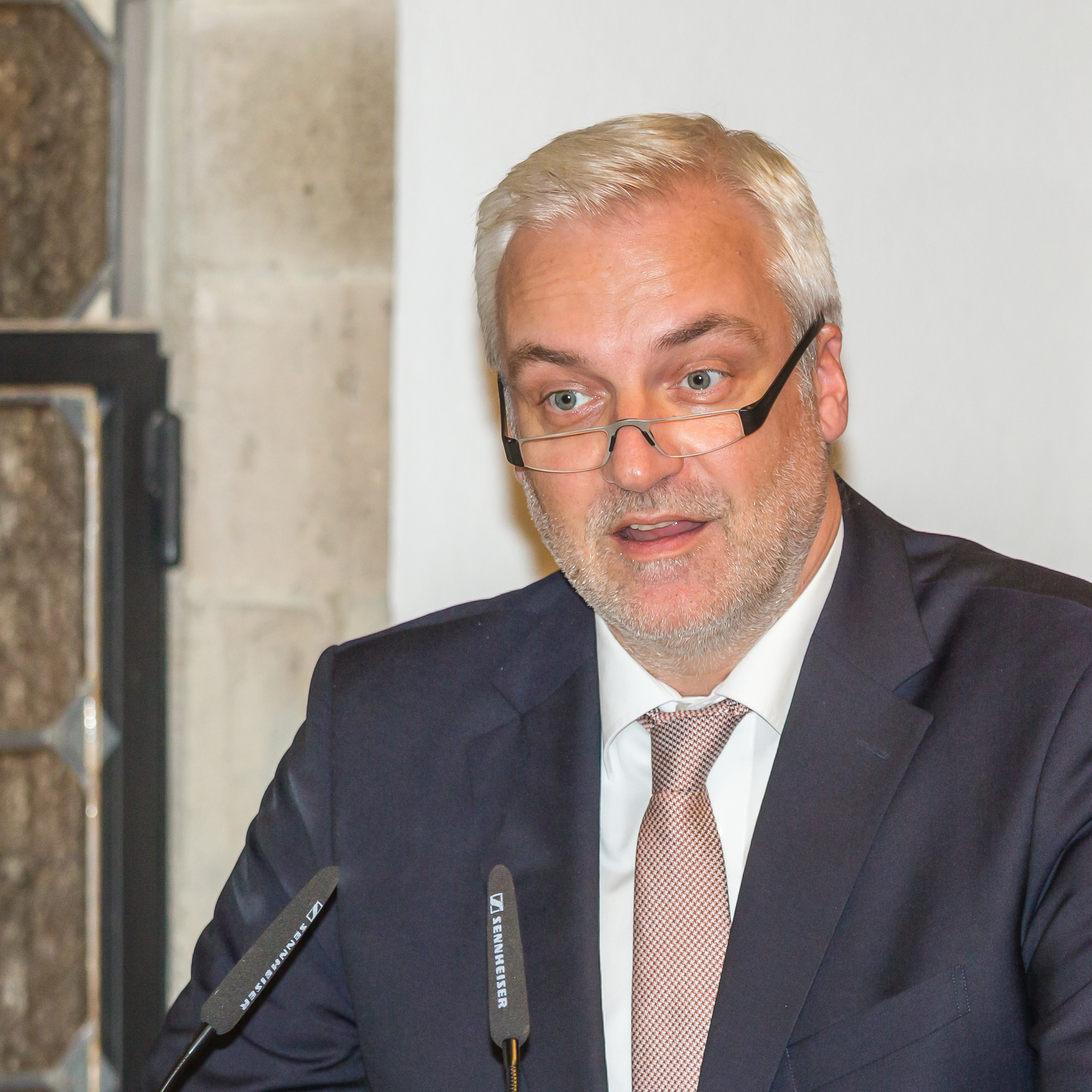 Verleihung des Europäischen Handwerkspreises an Karl Kardinal Lehmann Garrelt Duin, Minister für Wirtschaft, Energie, Industrie, Mittelstand und Handwerk des Landes Nordrhein-Westfalen